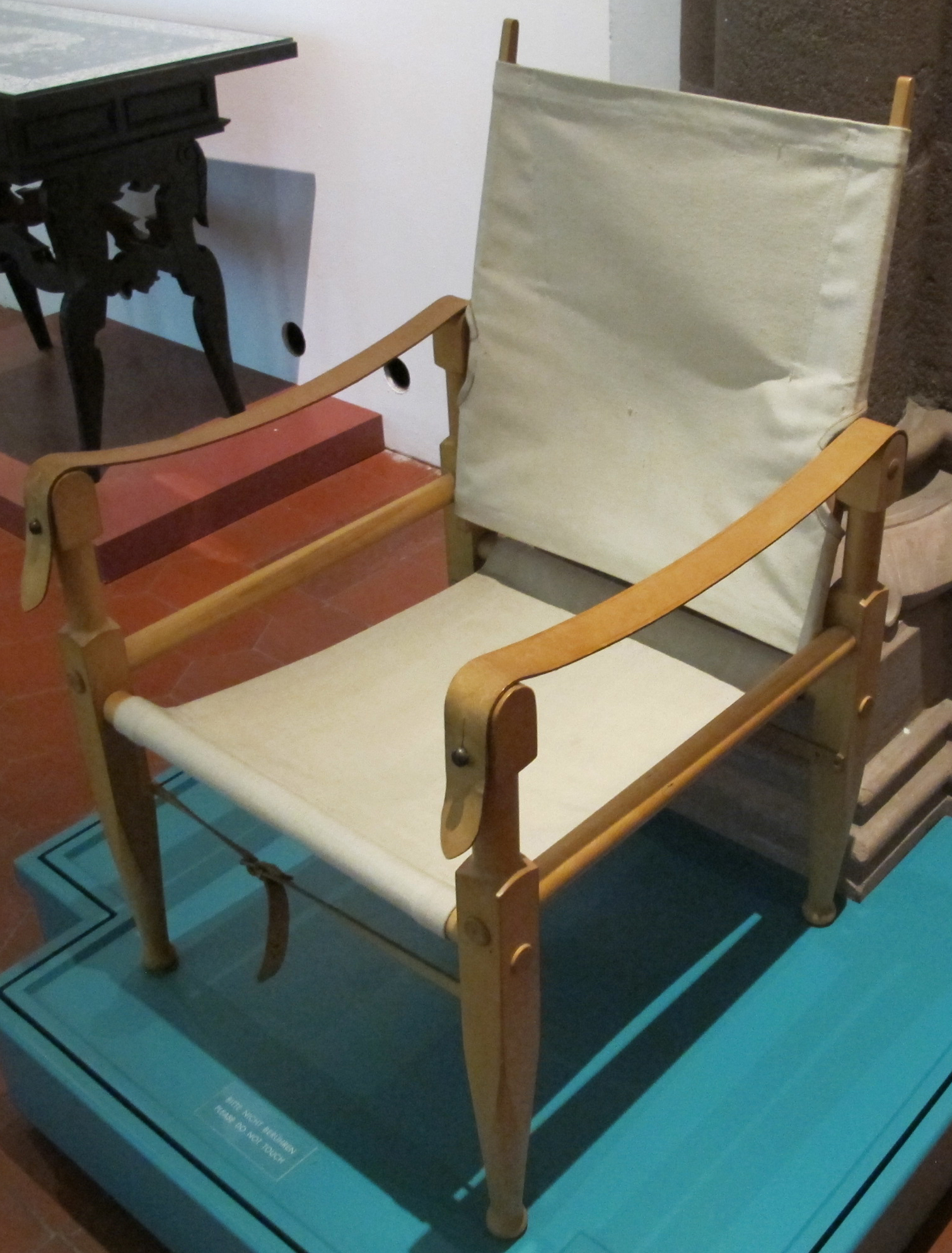 Sedia safari, design kaare klint, 1933, realizzata 1964